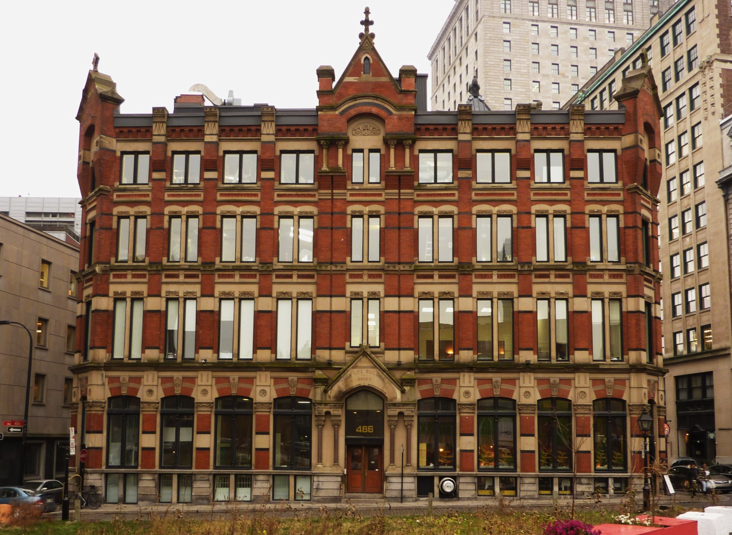 Édifice Waddell-Sun Life Building Annex / Élévation Est. Construction: 1884 / John W. & Edward Hopkins. En 1879, le marchand de matériel ferroviaire Samuel Waddell acquiert un lot de la Metropolitan Bank & Henry Morgan. Waddell fait démolir les bâtiments qui s'y trouvent au printemps 1884 puis entame la construction de cet édifice qui sera terminé fin 1884. En 1885, la Compagnie de Téléphone Bell occupe preque tout le premier étage. En 1897, la Compagnie d'Assurance Sun Life, qui na déjà construit un édifice sur le lot voisin, achète l'immeuble et en fait son annexe. Ce bâtiment a aussi une façade sur rue Notre-Dame aux 260 et 264 Bâtiment imposant utilisant la polychromie des matériaux: brique rouge, grès chamois (Angleterre), granit rouge de Kingston (Ontario). Source: le patrimoine du Vieux-Montréal en détail.